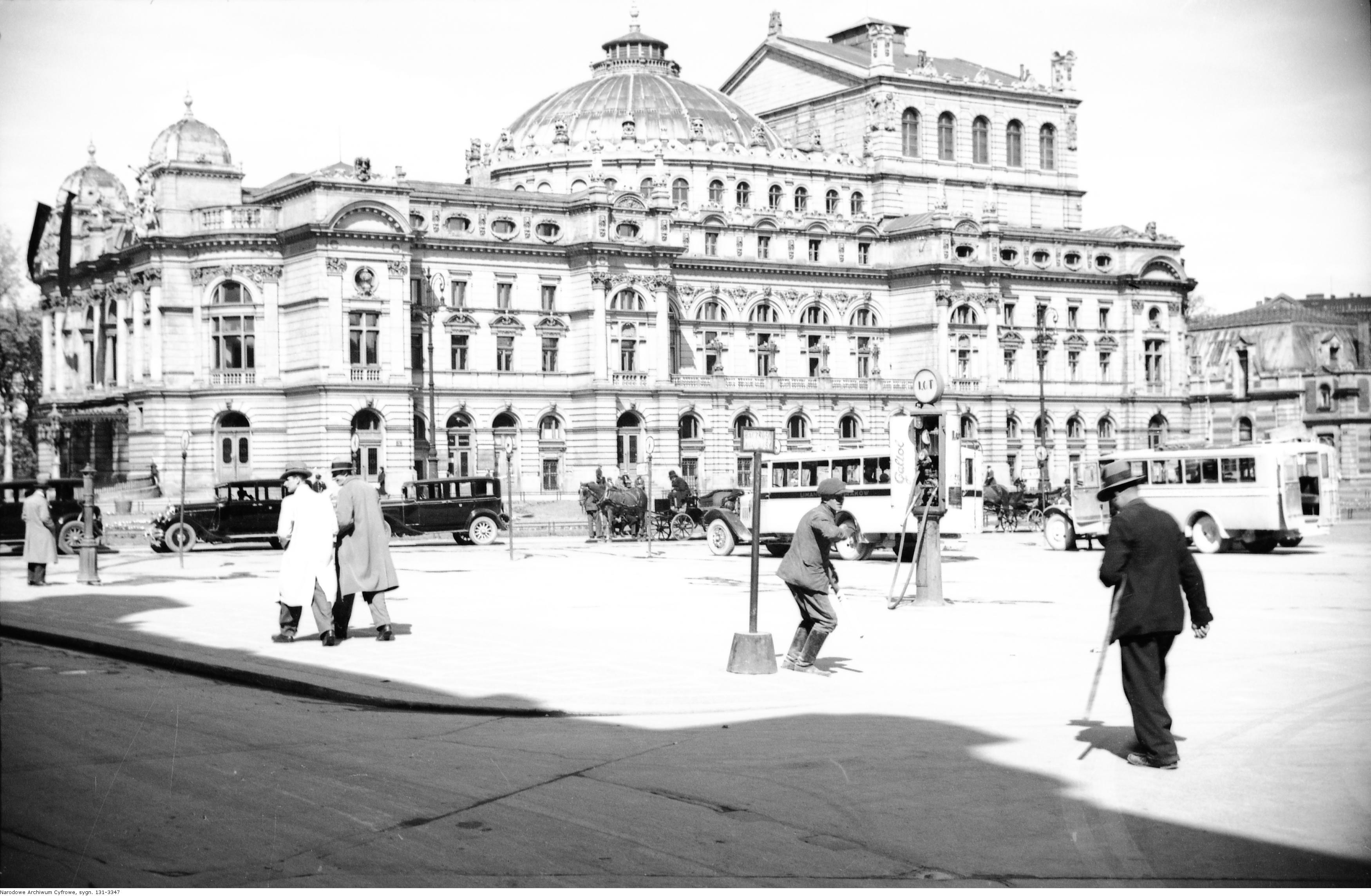 [Budynek Teatru im. Juliusza Słowackiego na pl. Świętego Ducha.]